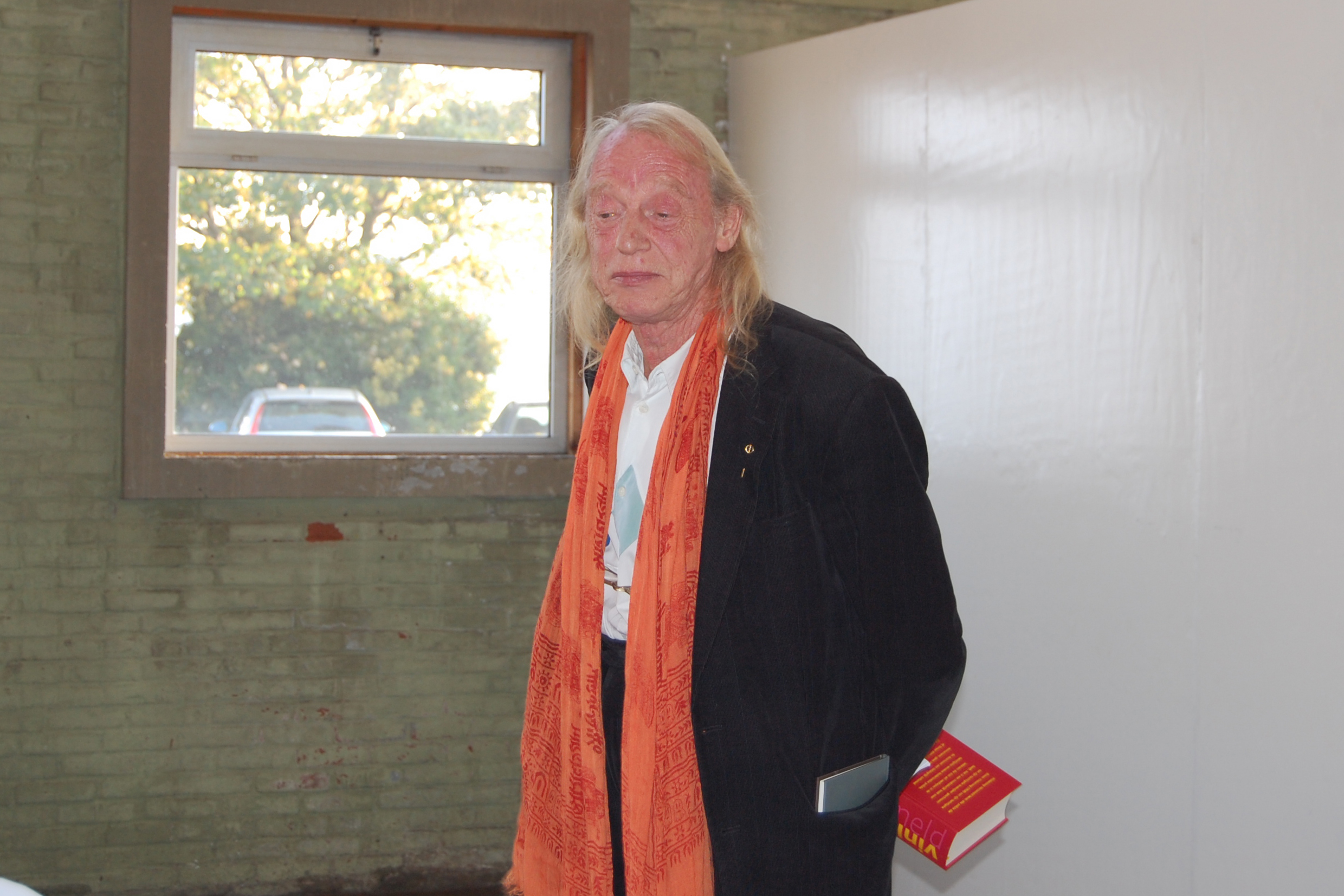 Simon Vinkenoog, Dutch writerVinkenoog bij de uitgave van zijn complete verzamelde gedichten, getiteld Vinkenoog Verzameld, in restaurant De Goudfazant op 12 oktober 2008